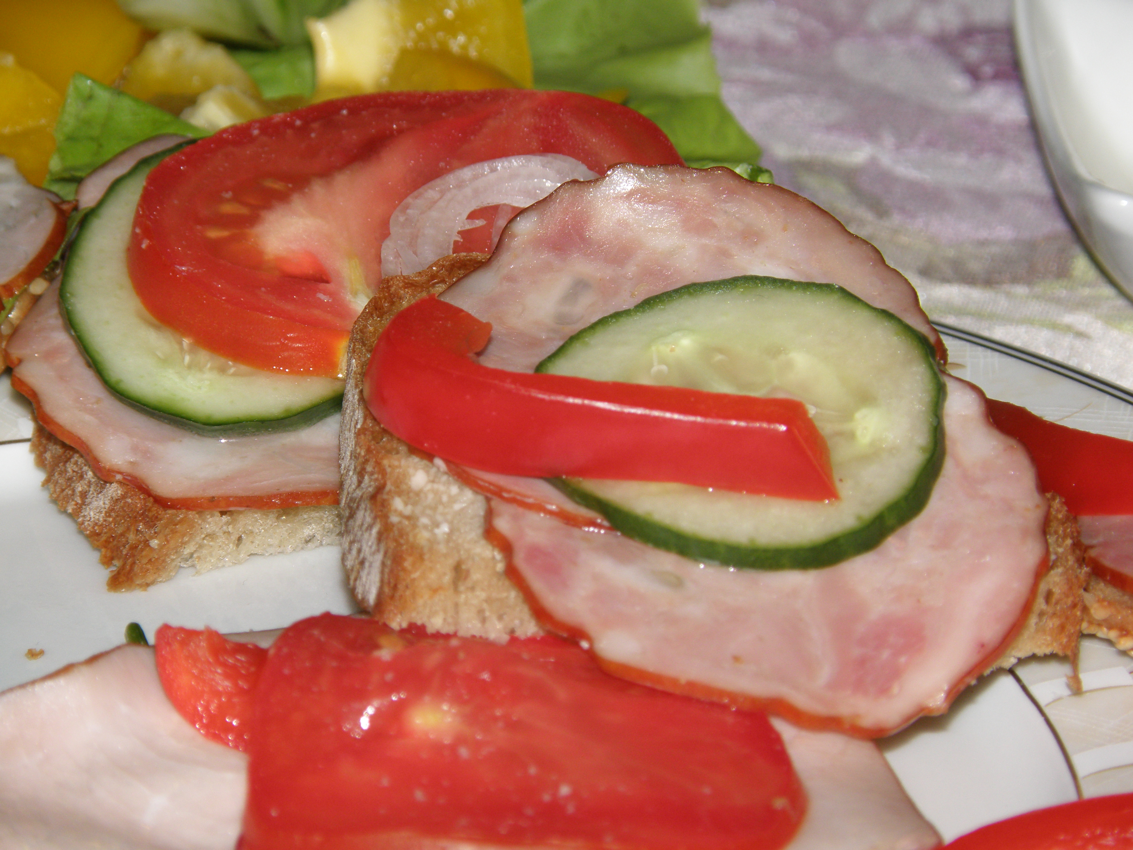 Kanapki